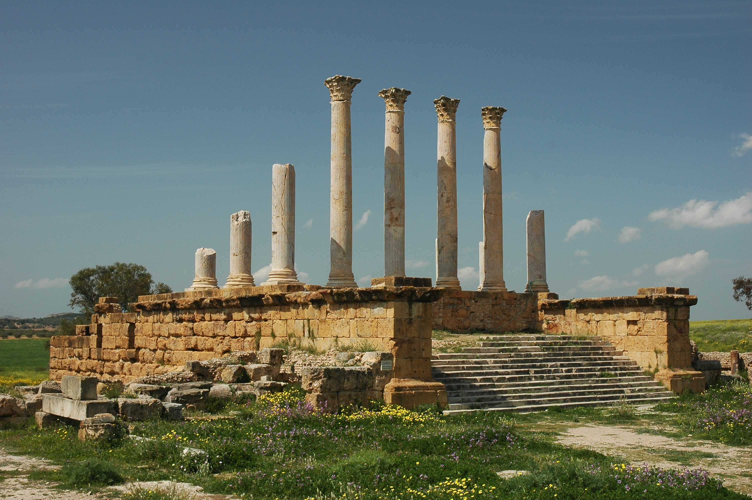 Thuburbo Majus en Tunisie